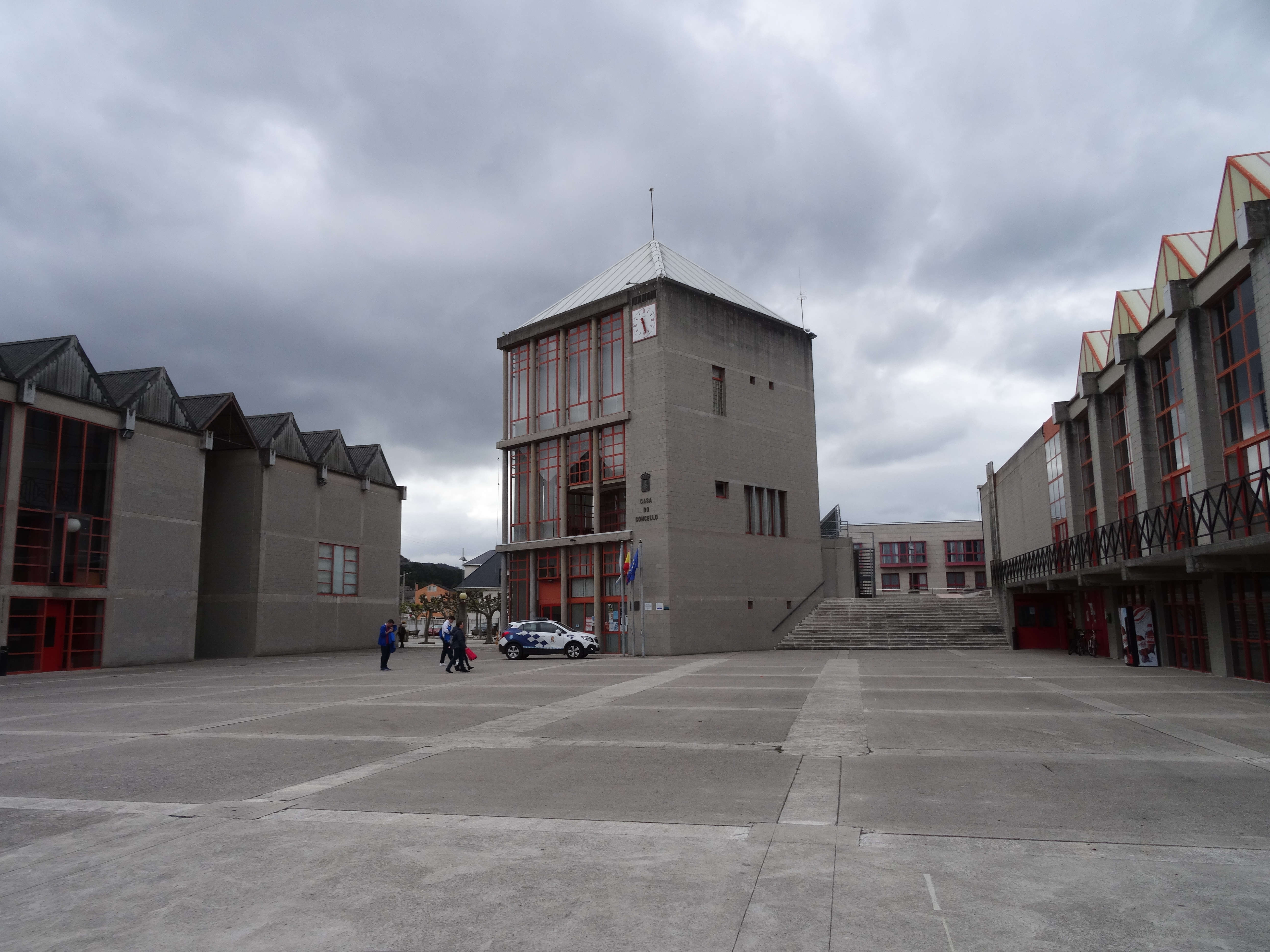 Ver título